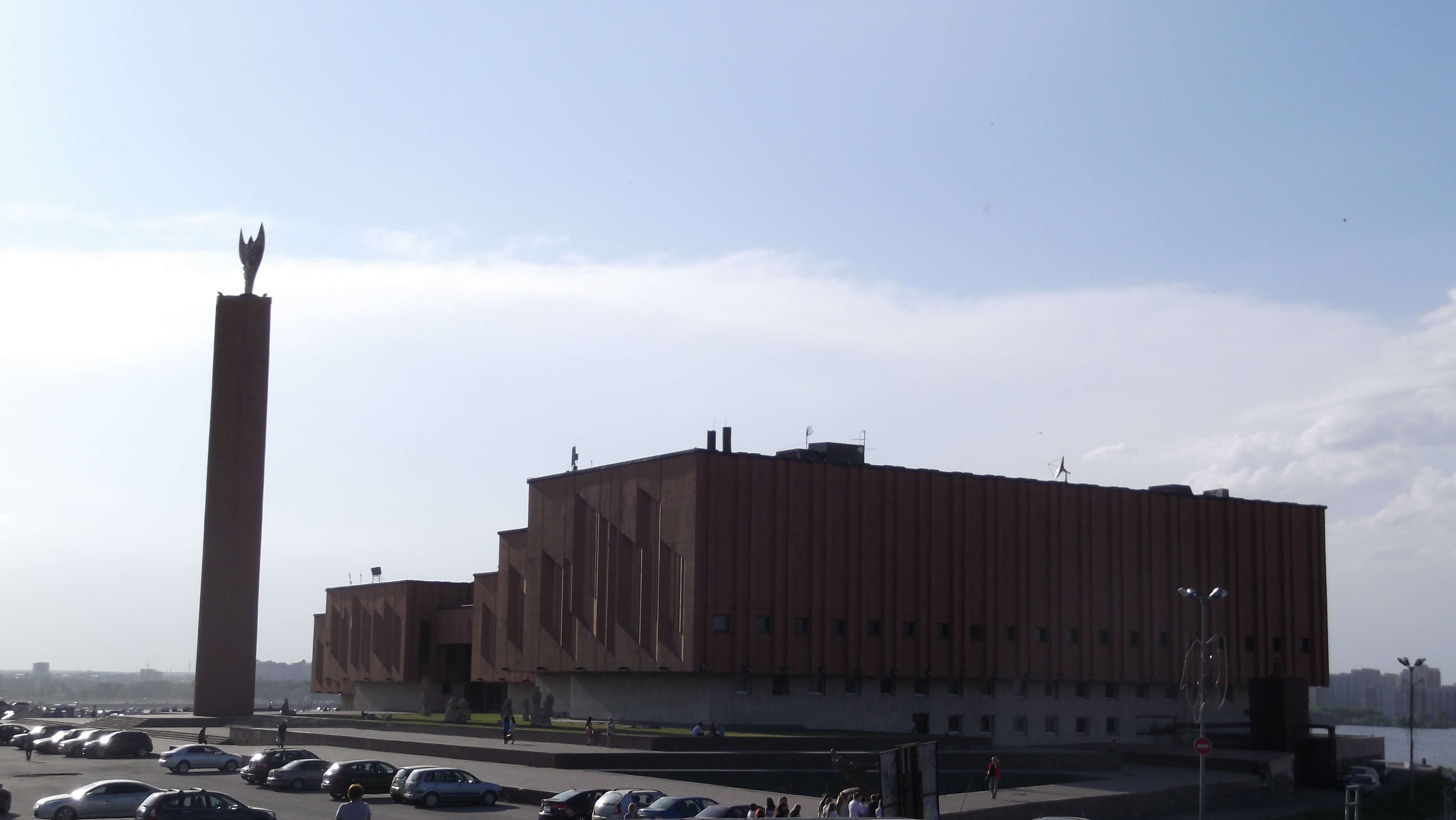 Vakhitovskiy rayon, Kazan, Respublika Tatarstan, Russia